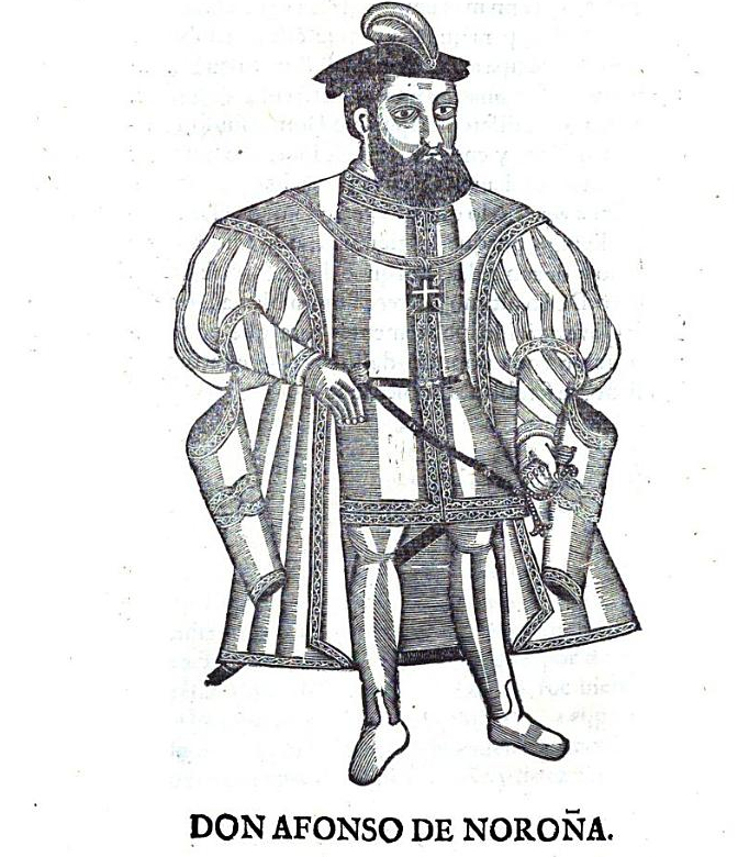 D._Afonso_de_Noronha vice-roi de l'Inde Portugaise